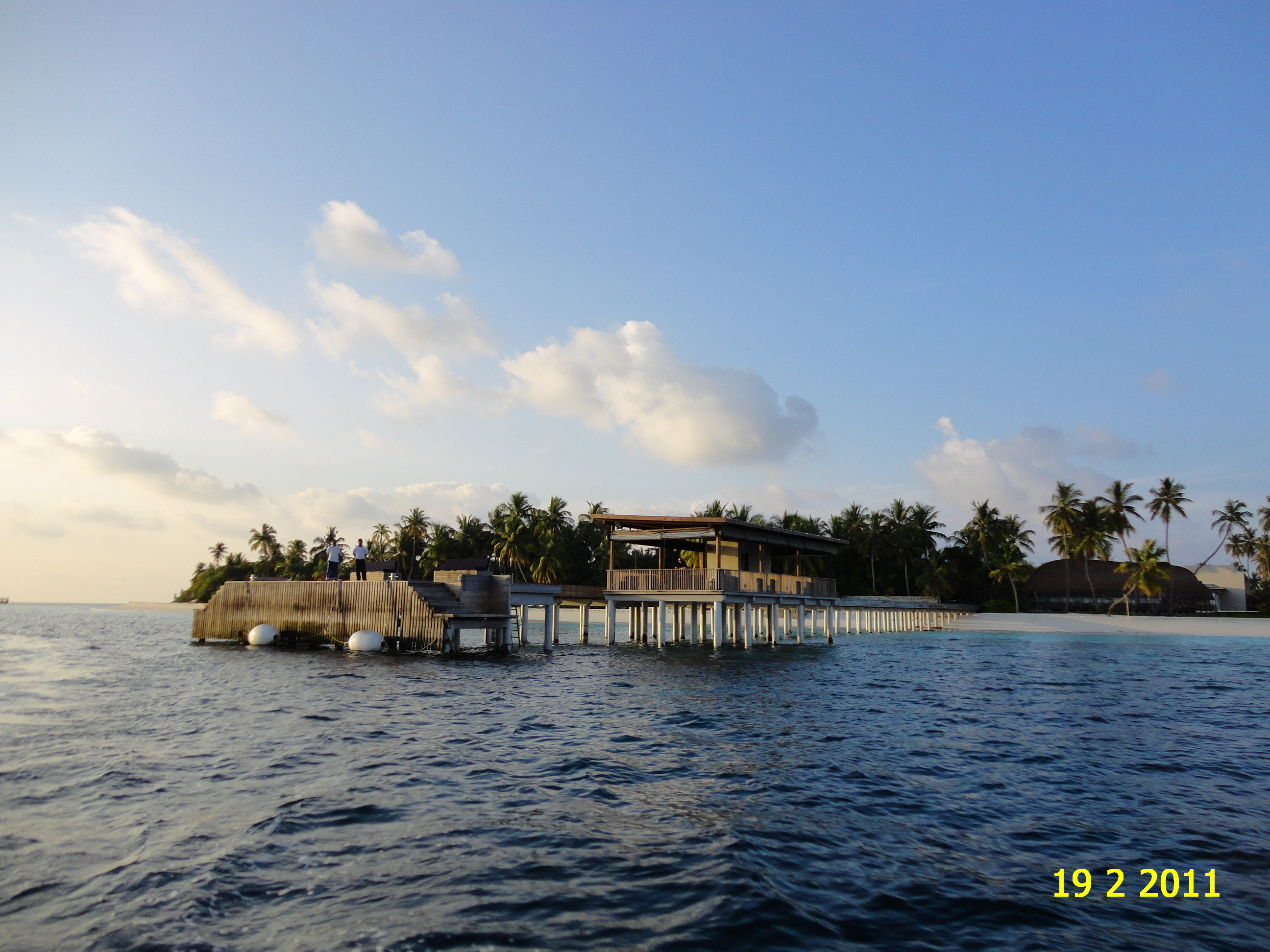 ALILA VILLAS HADAHAA 6